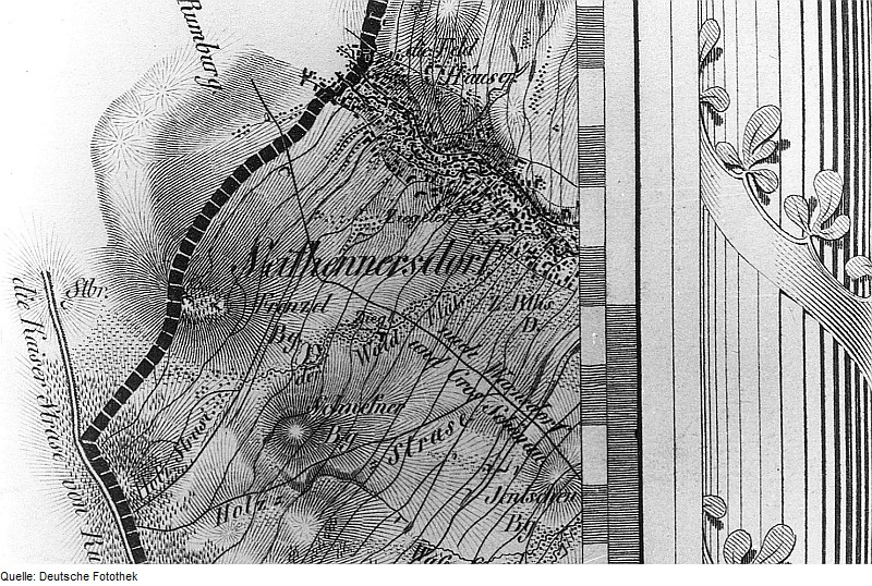 Original image description from the Deutsche Fotothek Seifhennersdorf. Oberreit, Sect. Stolpen, 1821/22